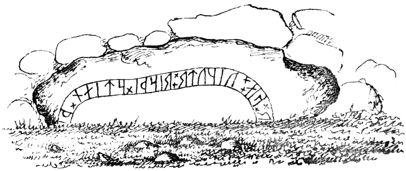 Östergötlands runinskrifter 197 inmurad i Sörby kyrkogårdsmur. Teckning i "Utdrag af Antiqvitets-Intendenten P. A. Säves afgifna berättelse för år 1861", publicerad i Antiqvarisk tidskrift för Sverige band 1, 1864.